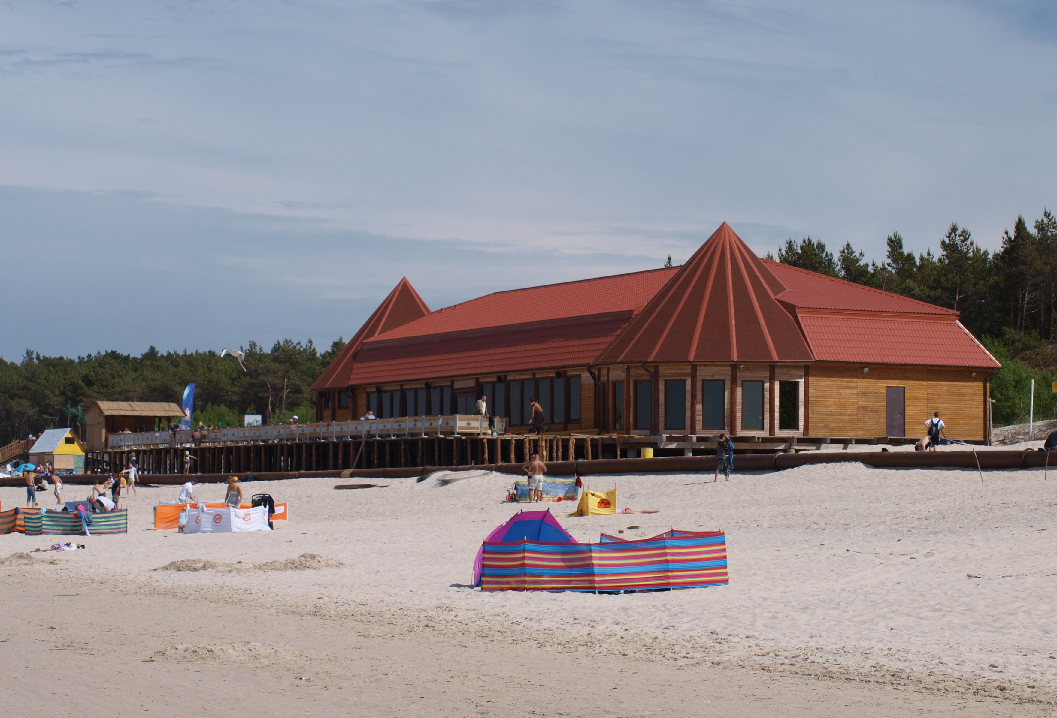 Plaża w Łebie.